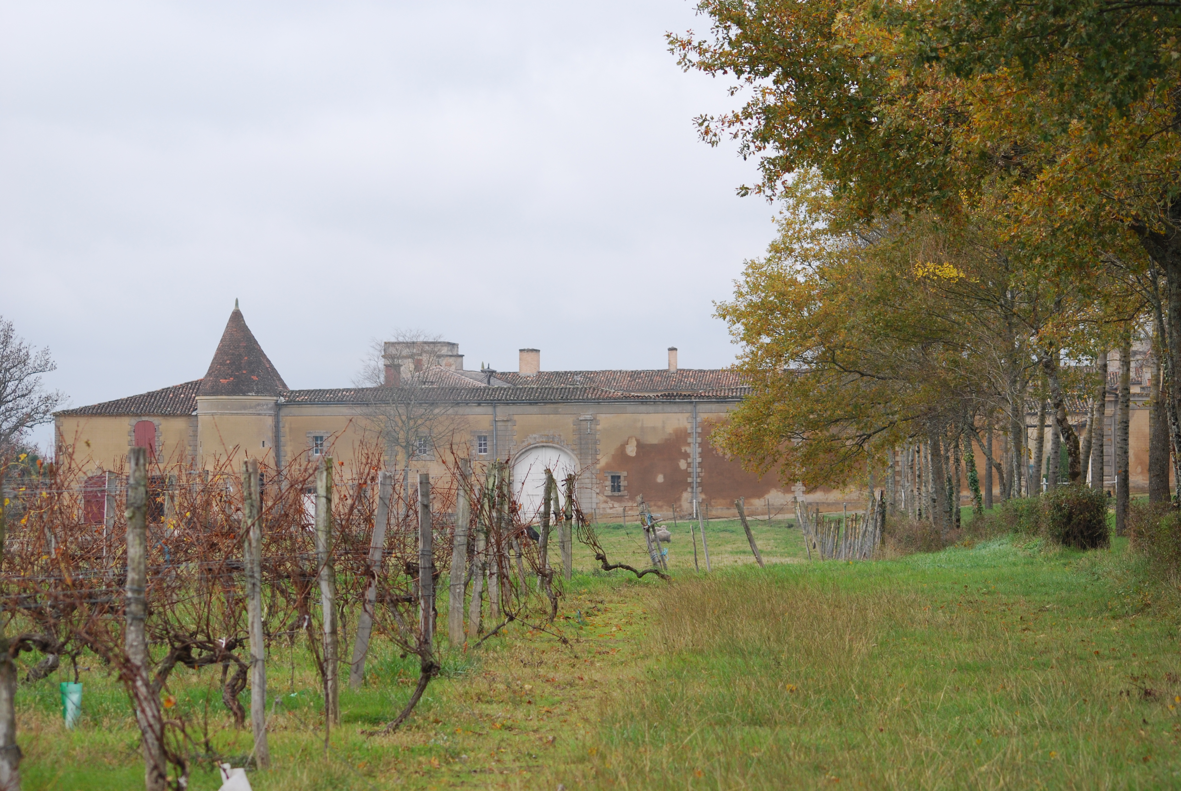 Château de Tustal, (Inscrit, 2008) .